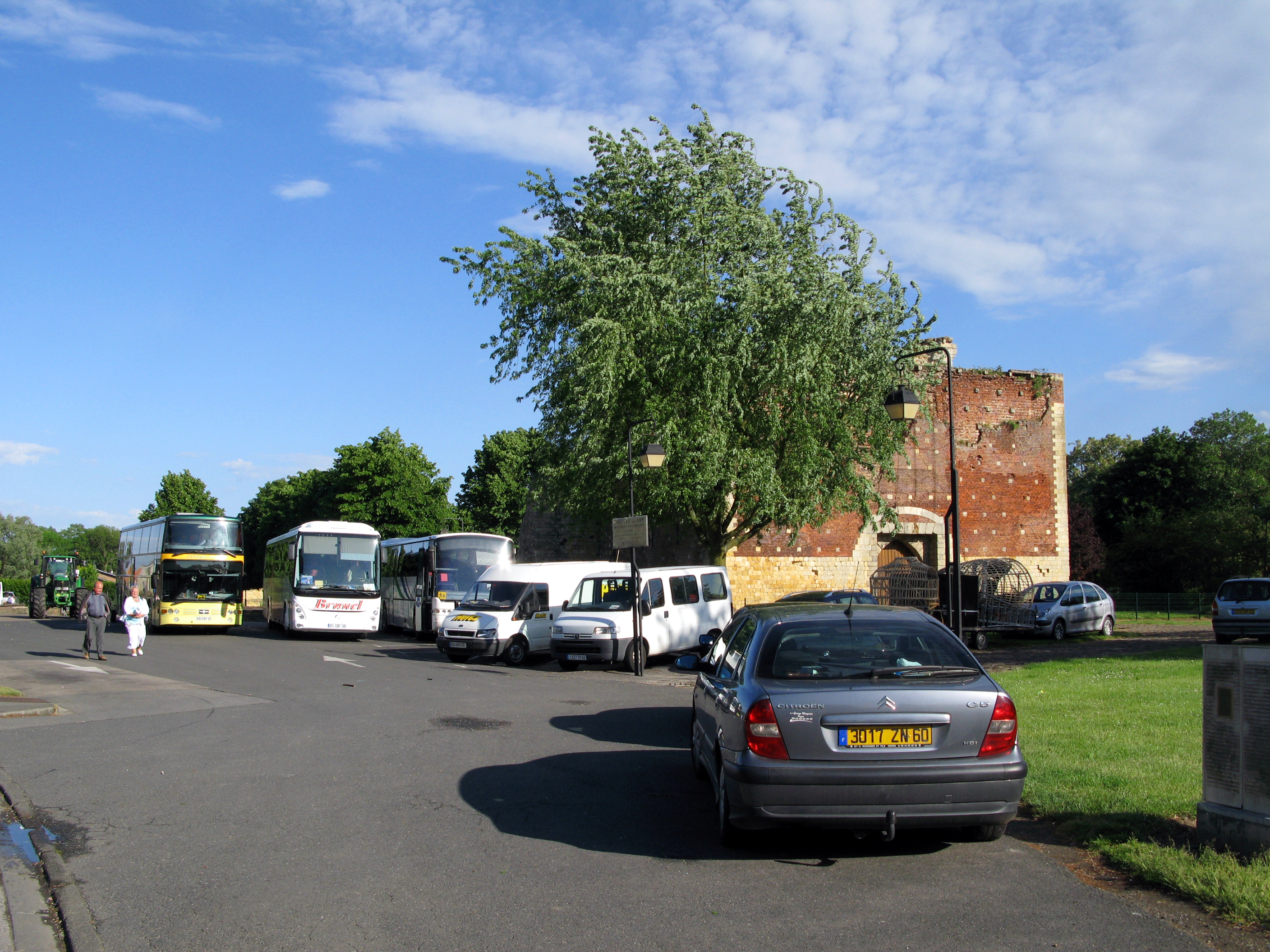 Ham (Somme, France) - Parking sur le côté du château.